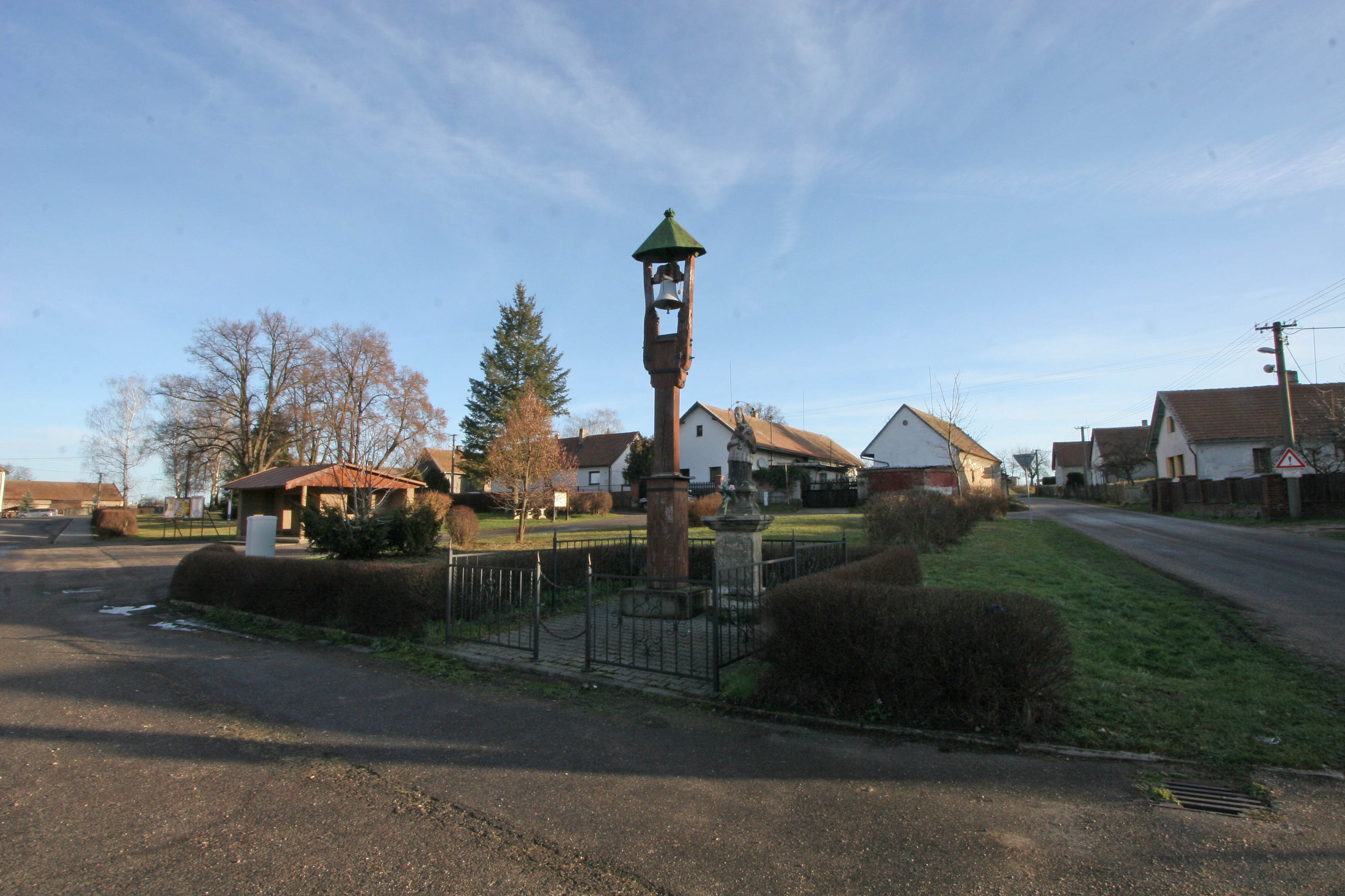 Dřenice zvonice